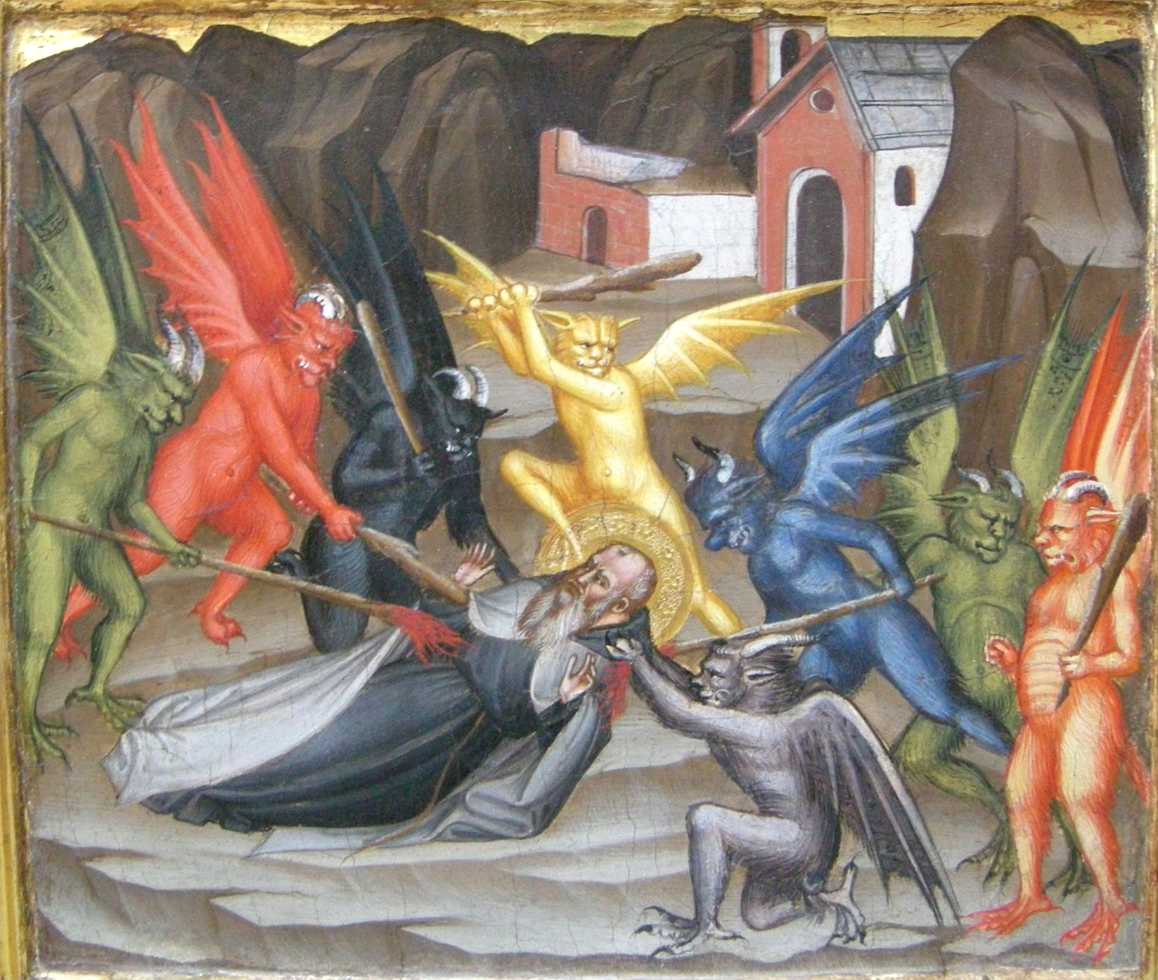 Cenni di francesco, incoronazione della vergine con sannti, anni 1390, predella 02 tentazioni di sant'antonio 2